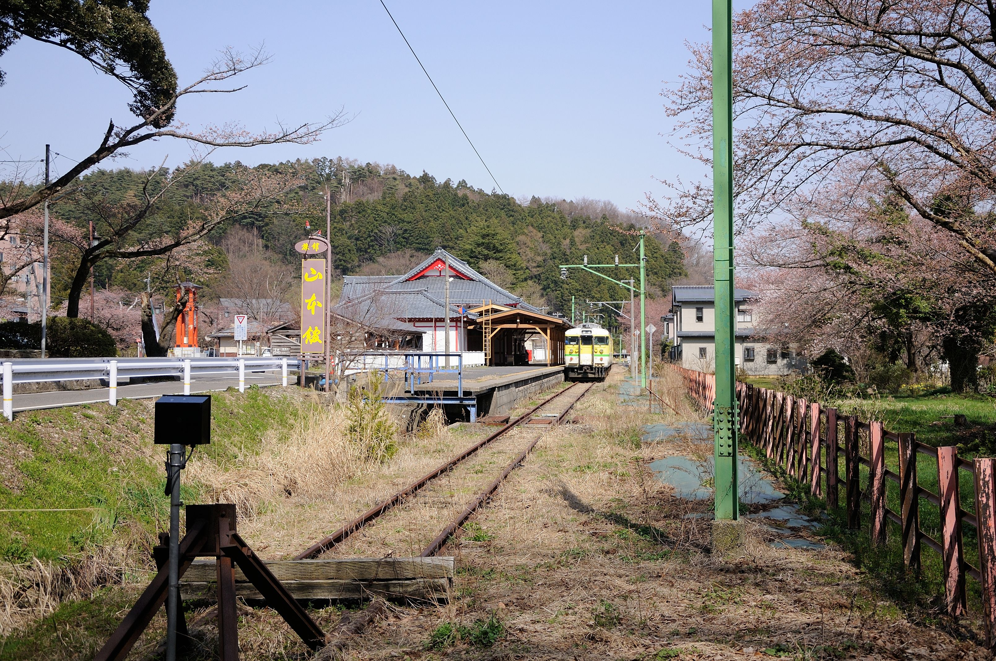 JR東日本弥彦線弥彦駅。